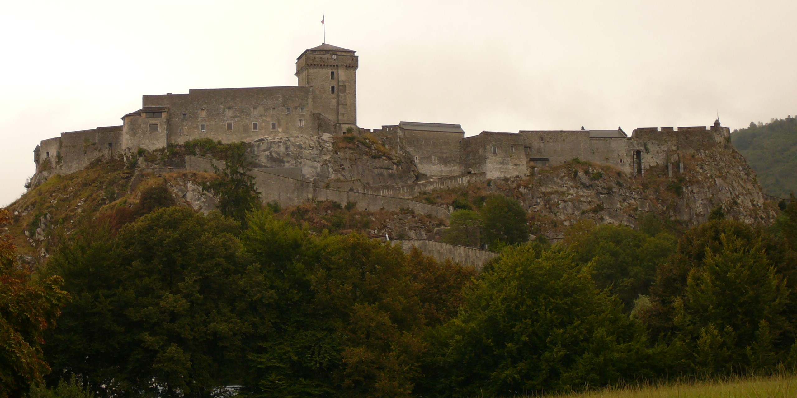 Forte di Lourdes